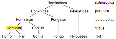 Rodoslovno stablo Hominoida